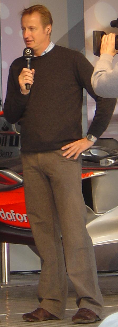 Florian König